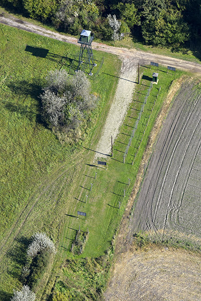 Hegykő - Vasfüggöny Emlékhely, légi felvételen